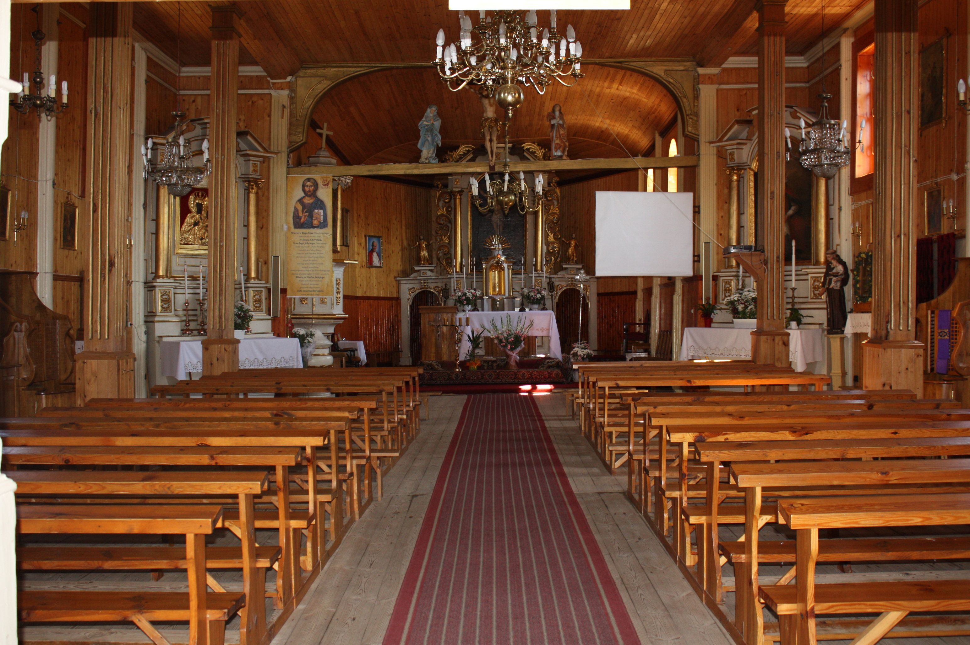 Wnętrze kościoła w Jeruzalu